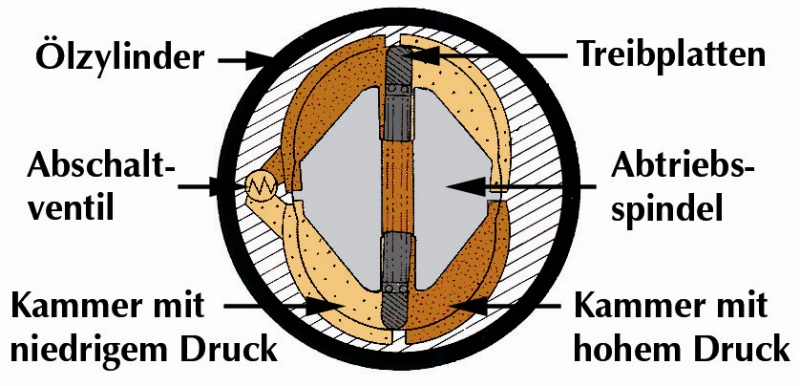 Doppelkammer-Impulseinheit